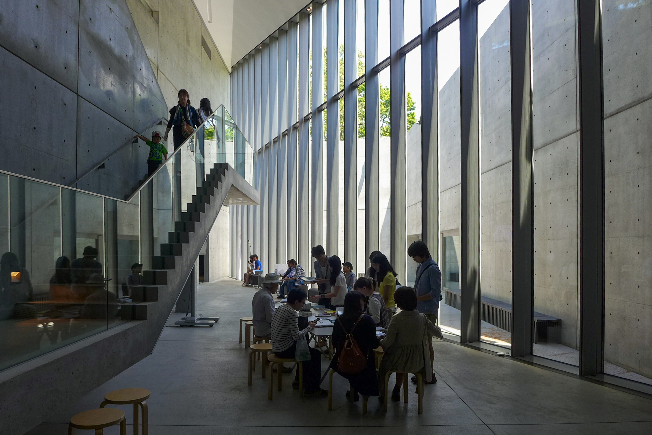 21 21 DESIGN SIGHT Interior